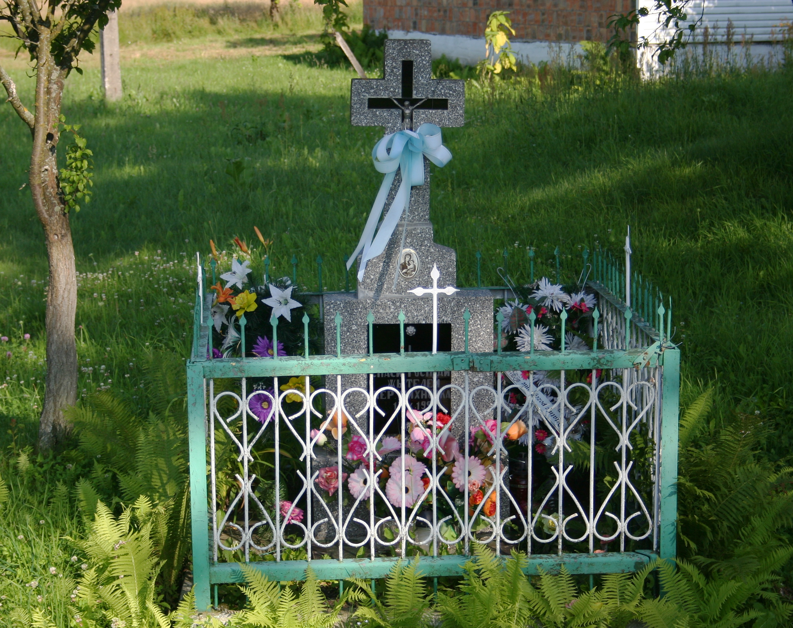 Krzyż przydrożny we wsi Michnówka, gmina Narewka, woj. podlaskie